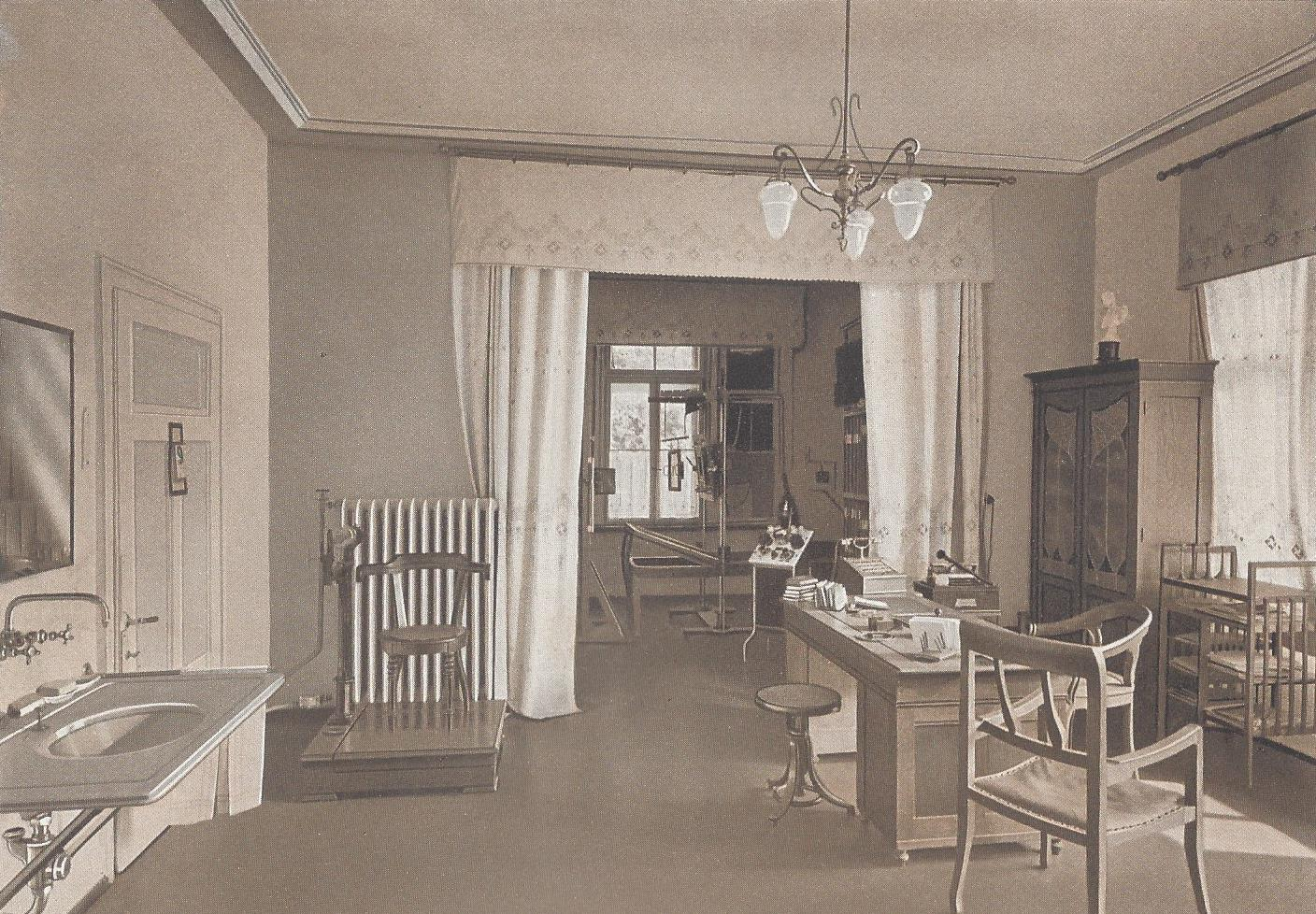 Sanatorium St. Blasien, Ärztliche Untersuchungsräume, Aufnahme 1914 aus: Sanatorium St. Blasien Heilanstalt für Lungenkranke, C.A. Wagner Freiburg